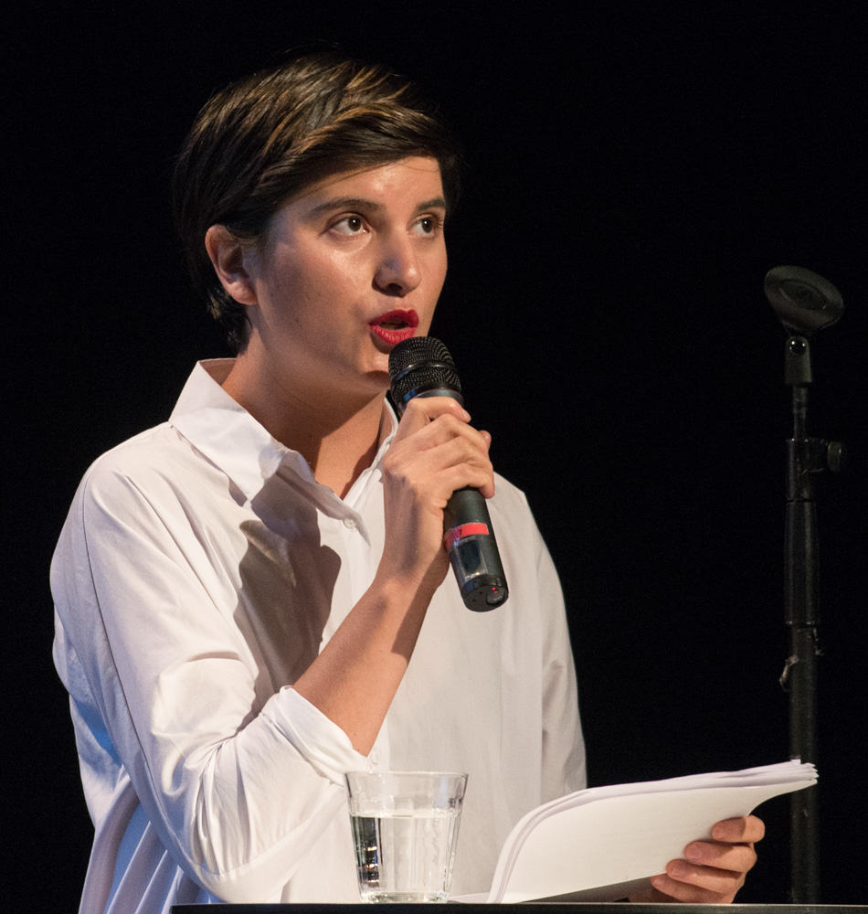 Sissela Nordling Blanco på ett seminarium om rasism, Stockholm - en stad för alla? på Kulturhuset Stadsteatern den 21 mars 2016.